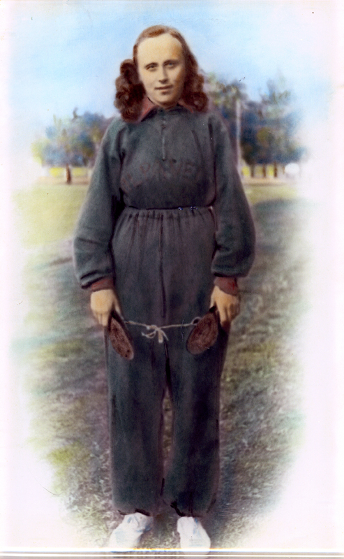 Suomen mestari 100 m vuonna 1950